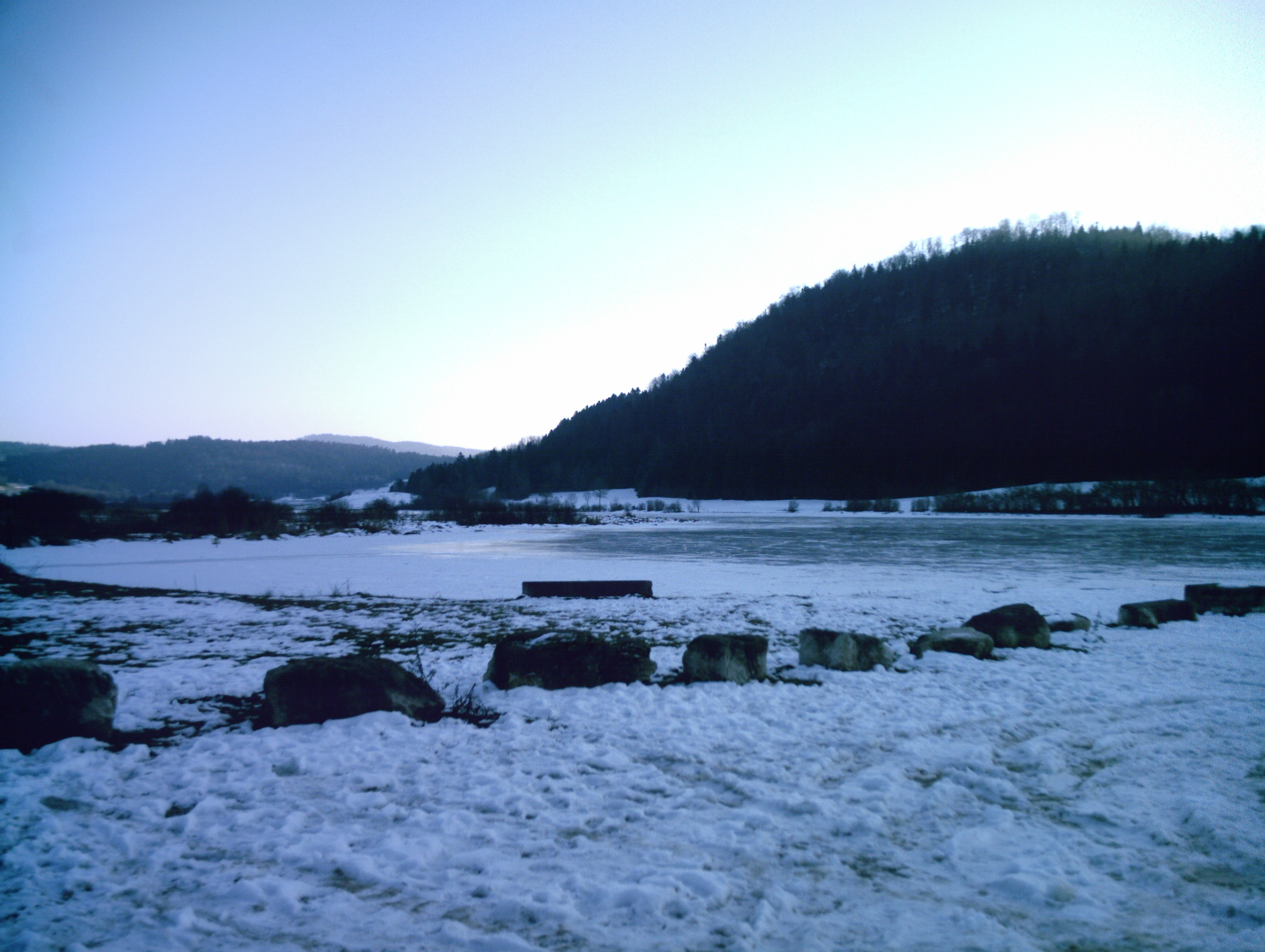 L'étang des Lésines gelé lors de l'hiver 2008 (Hauteville-Lompnès, Ain, FRANCE)